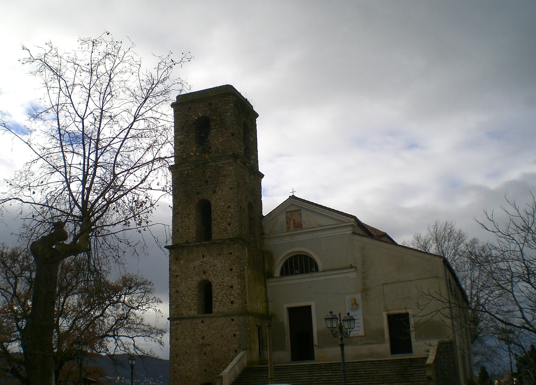 Chiesa parrocchiale di Prignano Cilento.